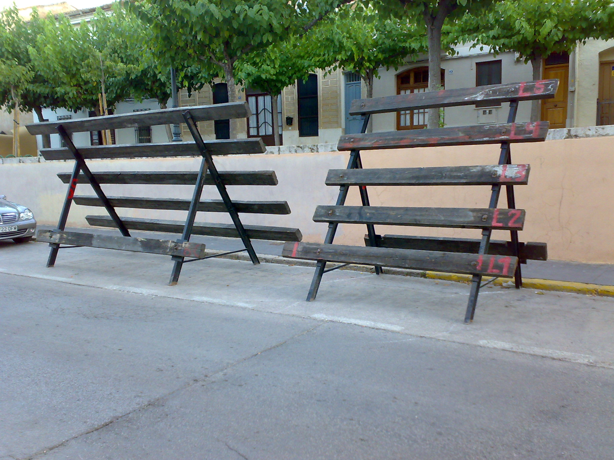 Defensas preparadas en el Carrer Major de Godella para los Bous al carrer de 2010